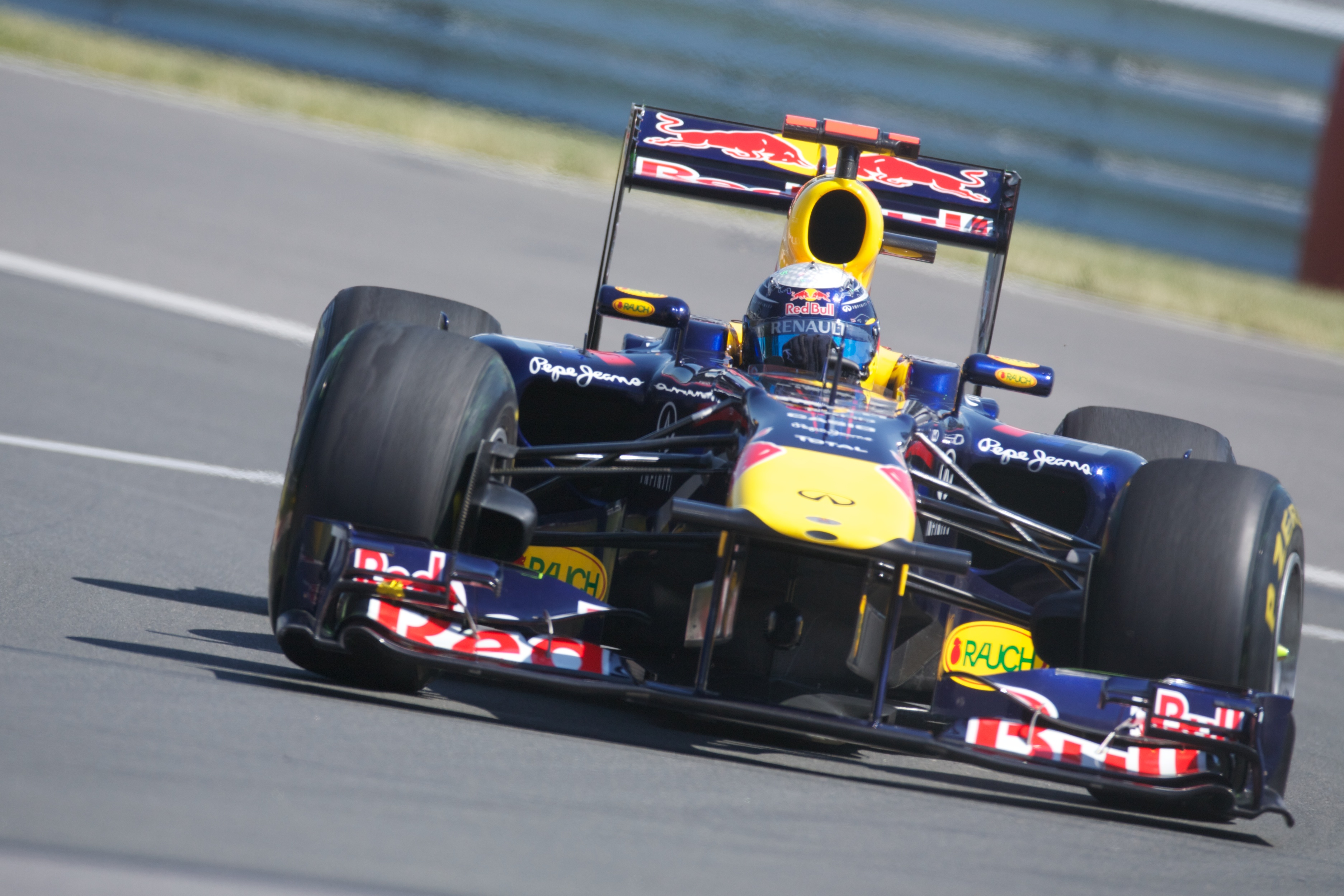 Sebastian Vettel au GP du Canada 2011